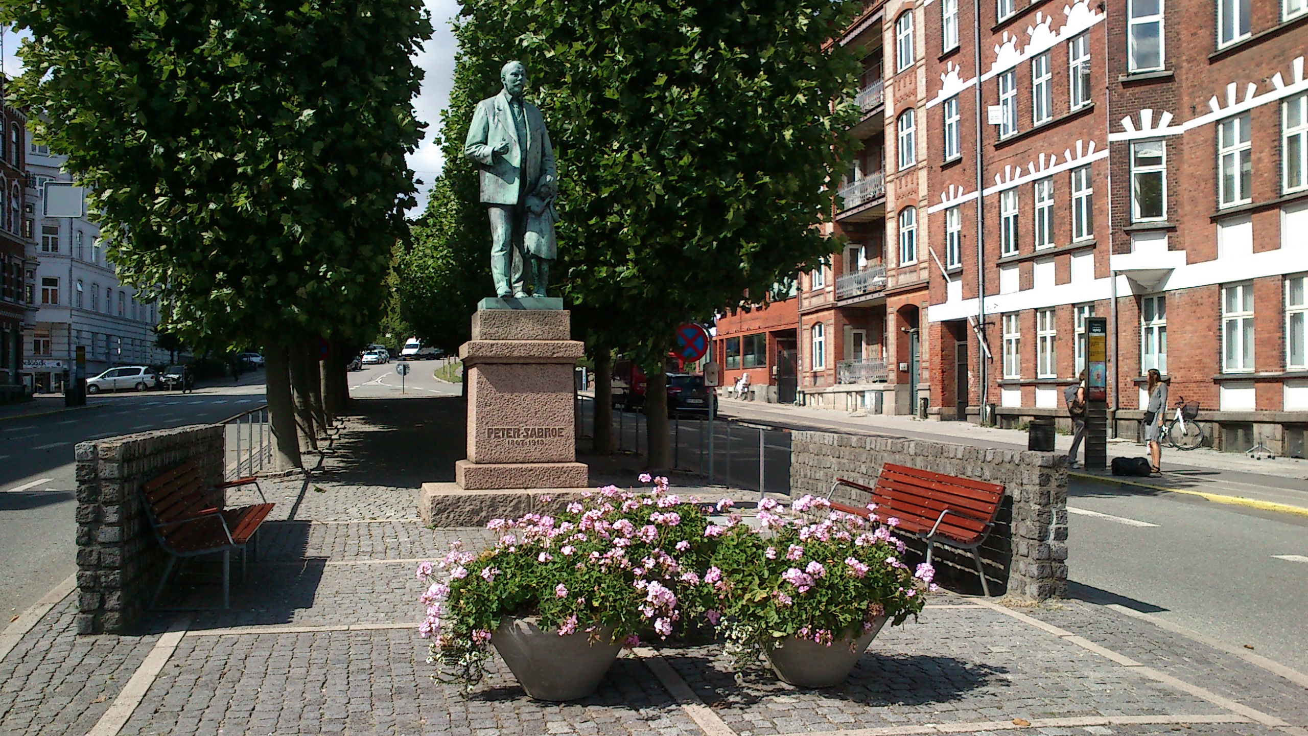 Østbanetorvet i Aarhus. Statuen viser Peter Sabroe.